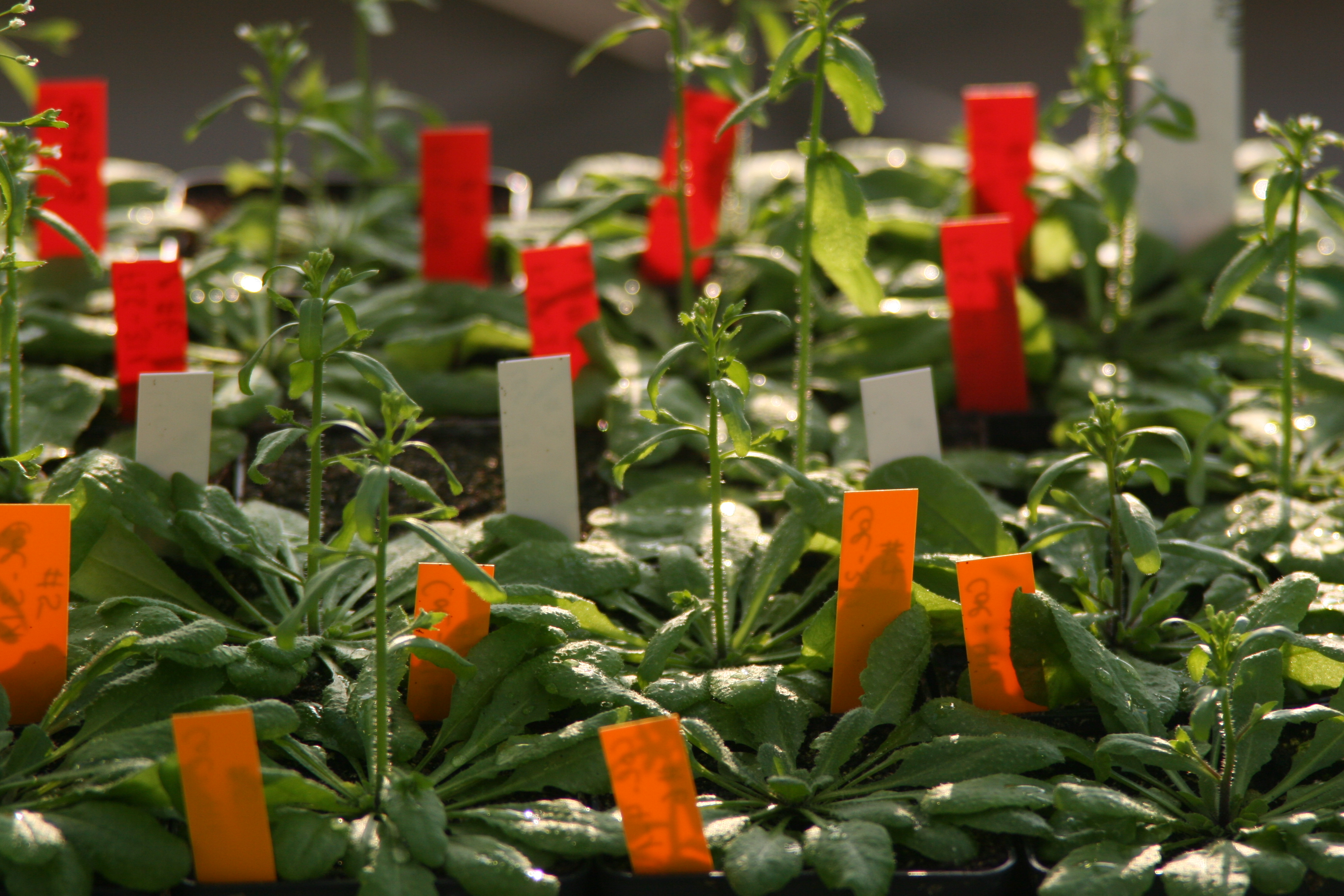 Modellorganismus Acker-Schmalwand (Arabidopsis thaliana) Versuchspflanzen im Gewächshaus. Die verschiedenen Pflanzen sind durch farbige Schildchen gekennzeichnet.